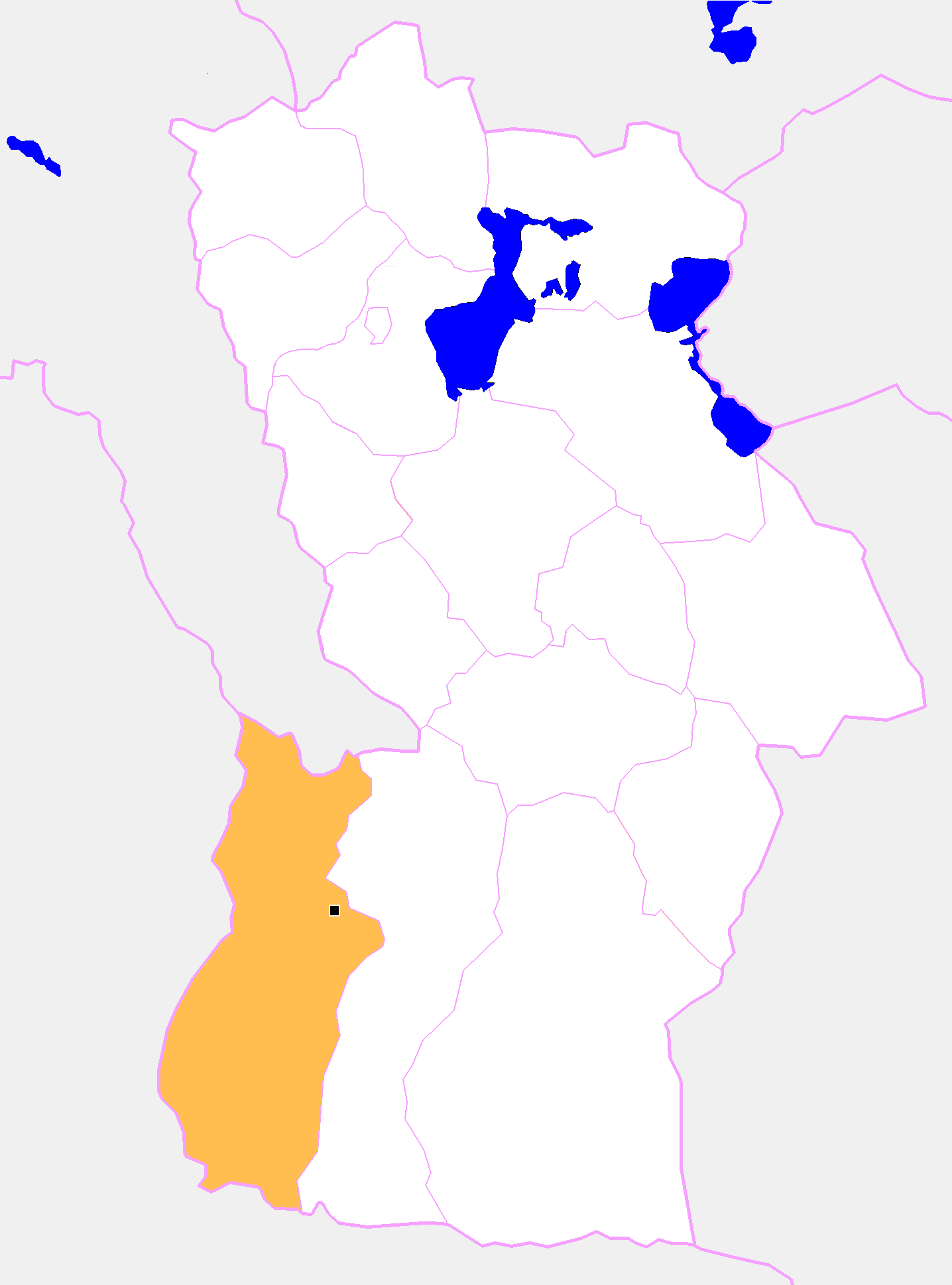 Монгол: Ховдын Булган